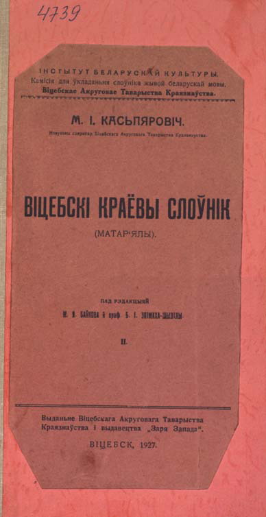 Беларуская (тарашкевіца): Кніга Мікалая Каспяровіча “Віцебскі краёвы слоўнік. Матэрыялы.” Вокладка